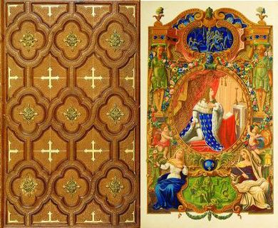 L'Imitation de Jesus-Christ. [О подражании Иисусу Христу: в 4 книгах]. - Paris: L. Curmer, Chromolithographie de Lemercier, typographie de J. Claye, 1855